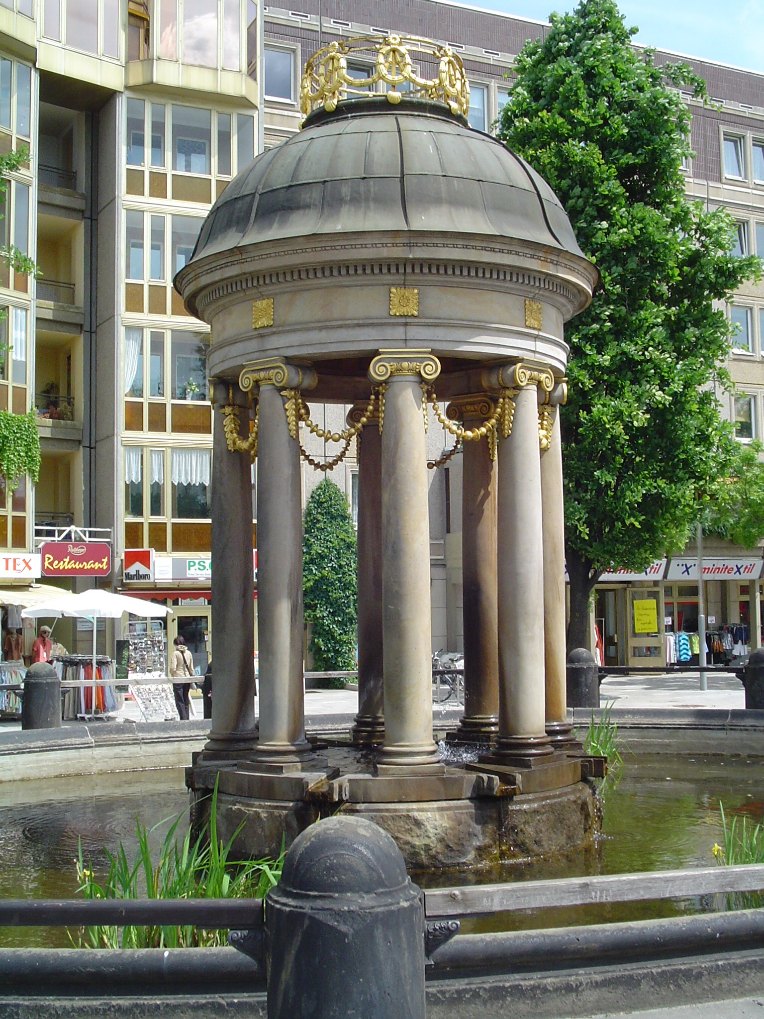 Artesischer Brunnen, Albertplatz, Dresden, Germany